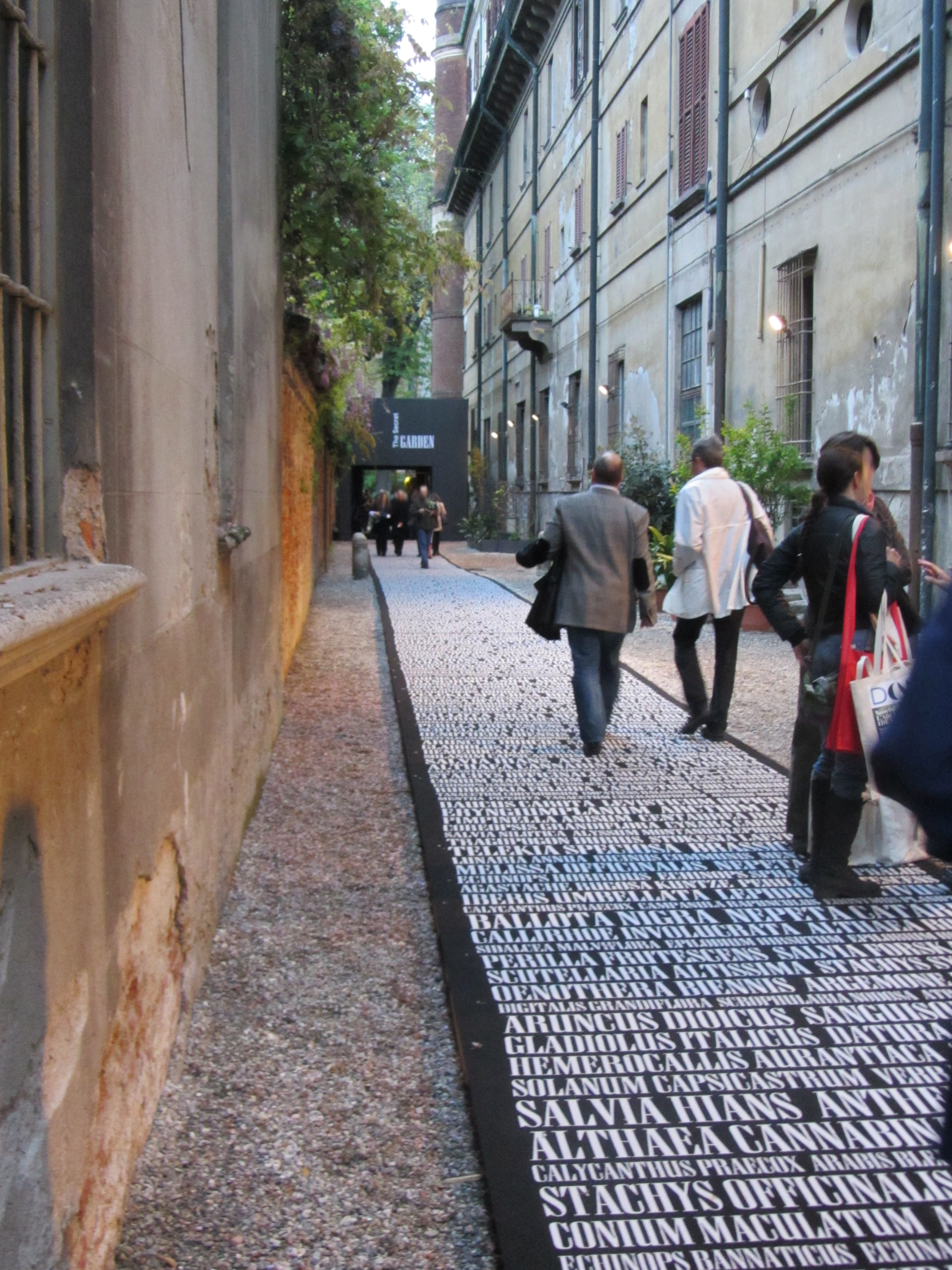 Evento " The Secret Garden " durante il Fuorisalone 2012 a milano all'interno dell'orto botanico di Brera. Evento organizzato dalle aziende CITCO (insieme a Zaha Hadid) e Barovier & Toso (insieme a Paola Navone nella foto l'allestimento realizzato dallo studio Calvi Brambilla di Milano